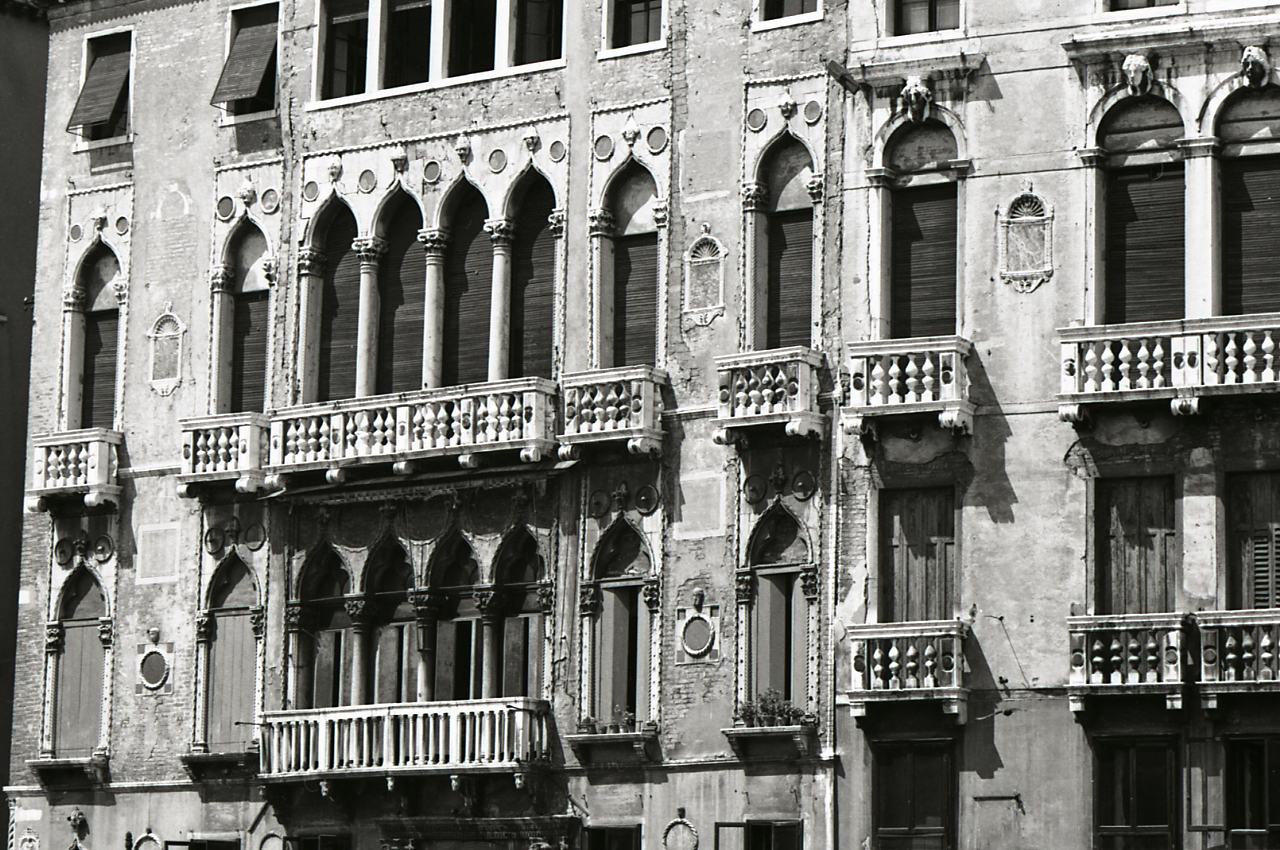 Serie fotografica : Venezia, 1969 / Paolo Monti. - Strisce: 7, Fotogrammi complessivi: 37 : Negativo b/n, gelatina bromuro d'argento/ pellicola ; 35 mm. - ((I fotogrammi hanno una doppia numerazione. . - Sul portanegativi: Nikon FP4. - All'interno del portanegativi Monti specifica alcuni soggetti. - Fonte: Agenda di Paolo Monti: Monti - Agenda 1969 (1969), presso Archivio Paolo Monti